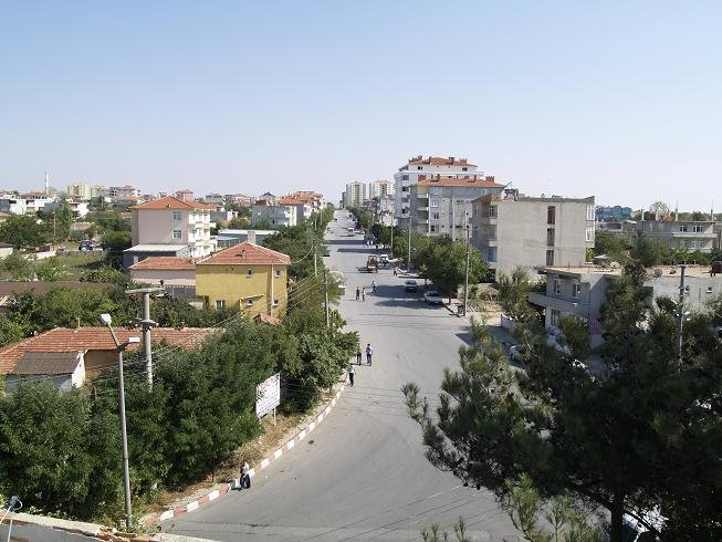 26 Temmuz 2009 da Kızılpınar Hürriyet Caddesi